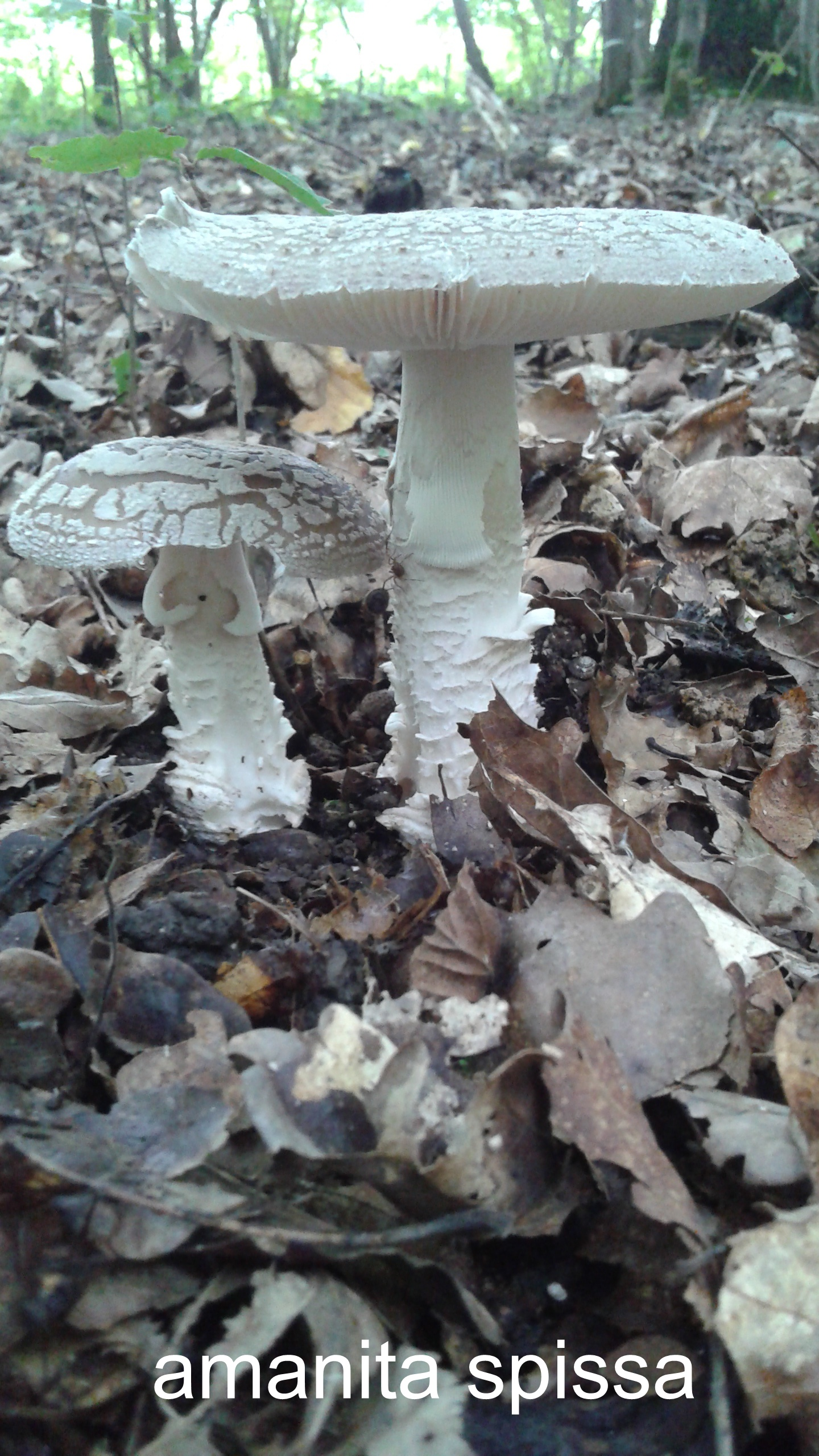 photo champignon amanita spissa